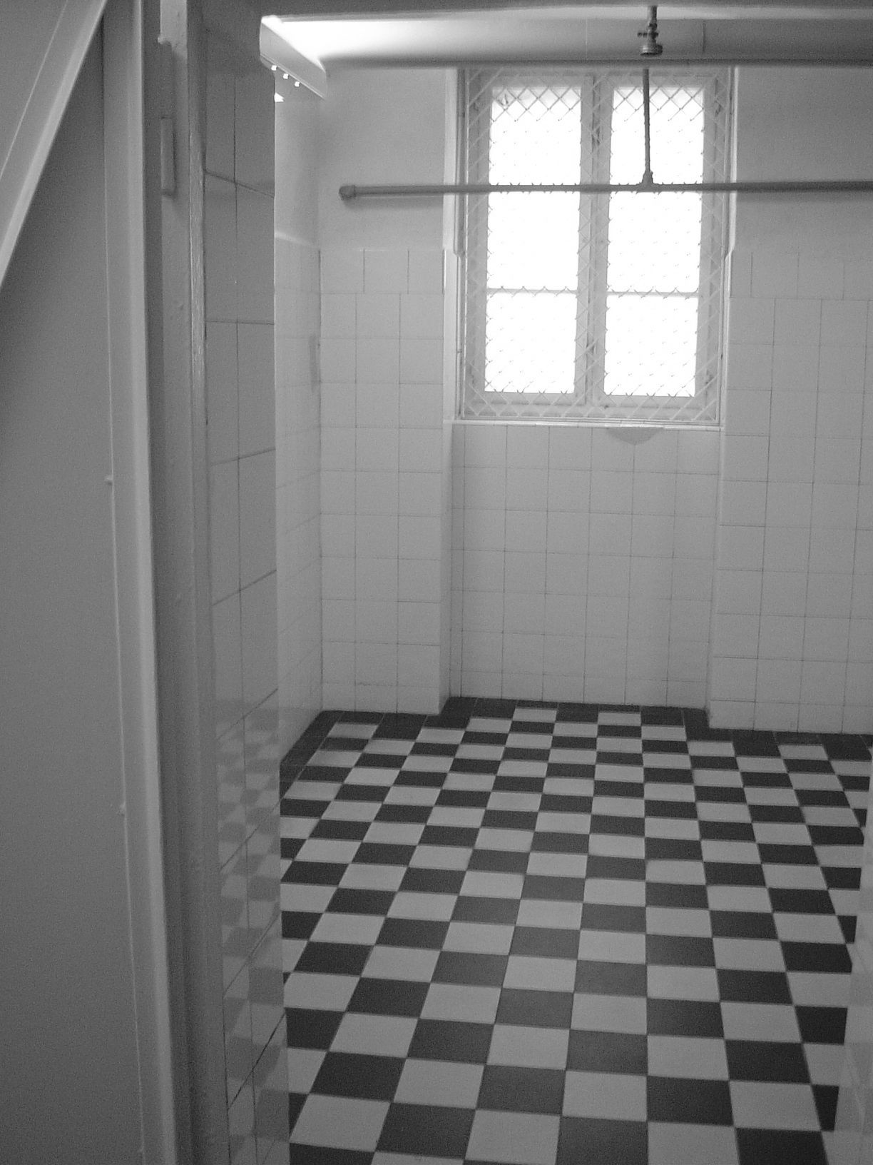 Die Gaskammer der Anstalt in Bernburg